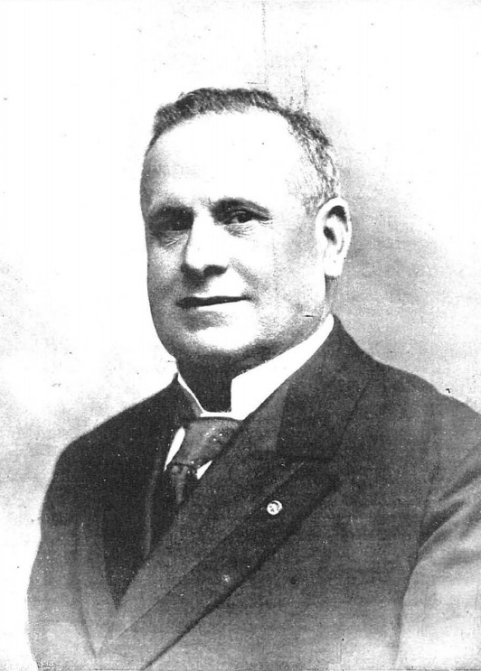 Retrato de Emilio Zurano por Kaulak y recogido en la revista española Nuevo Mundo.